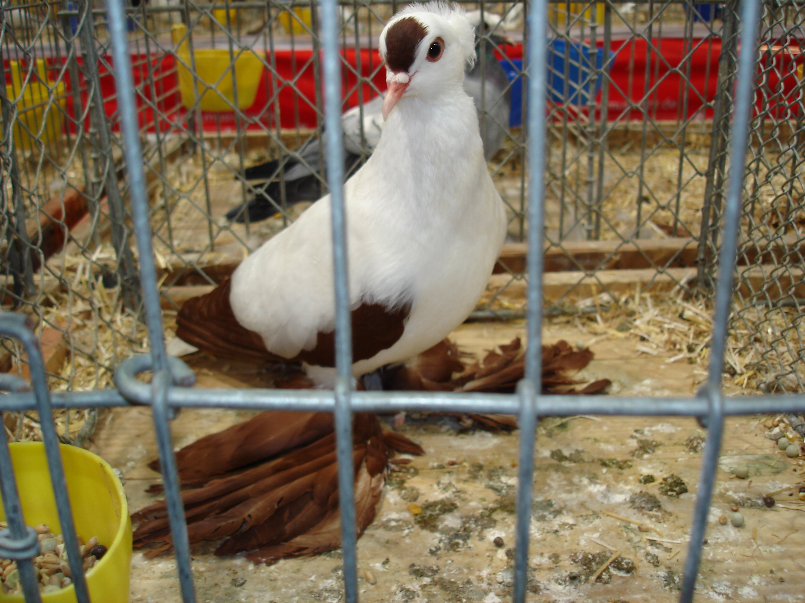 Zdjęcie gołębia rasy saksoński bocian